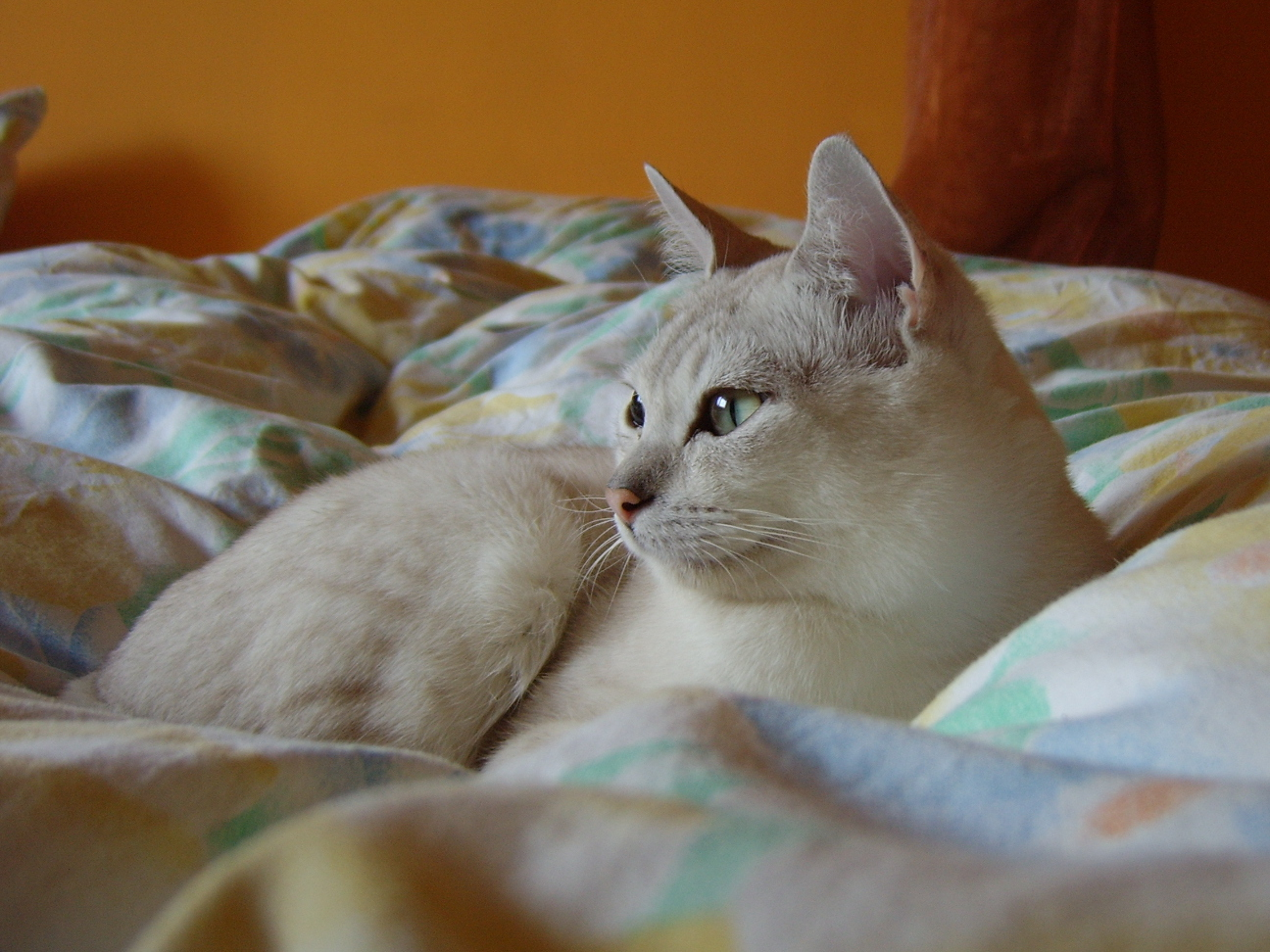 Un burmilla.